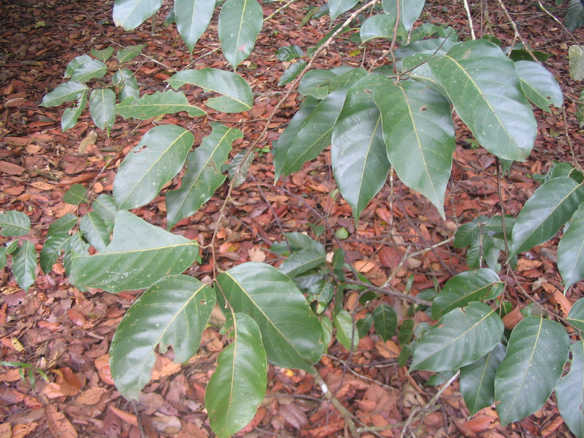 Shorea glauca - Forest Research Institute of Malaysia - Kepong - Malaysia